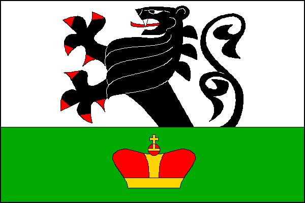 Vlajka obce Lukovany